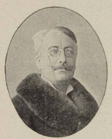 cliché Camus dans le livret de l'opérette Les quatre filles Aymon, (opérette d'Armand Liorat, Albert Fonteny et Paul Lacome) 1898 Type : image fixe Langue Bibliothèque nationale de France, département Arts du spectacle